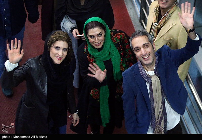 (از راست : امیر مهدی ژوله (چهارمین روز جشنواره فیلم فجر - پردیس ملت